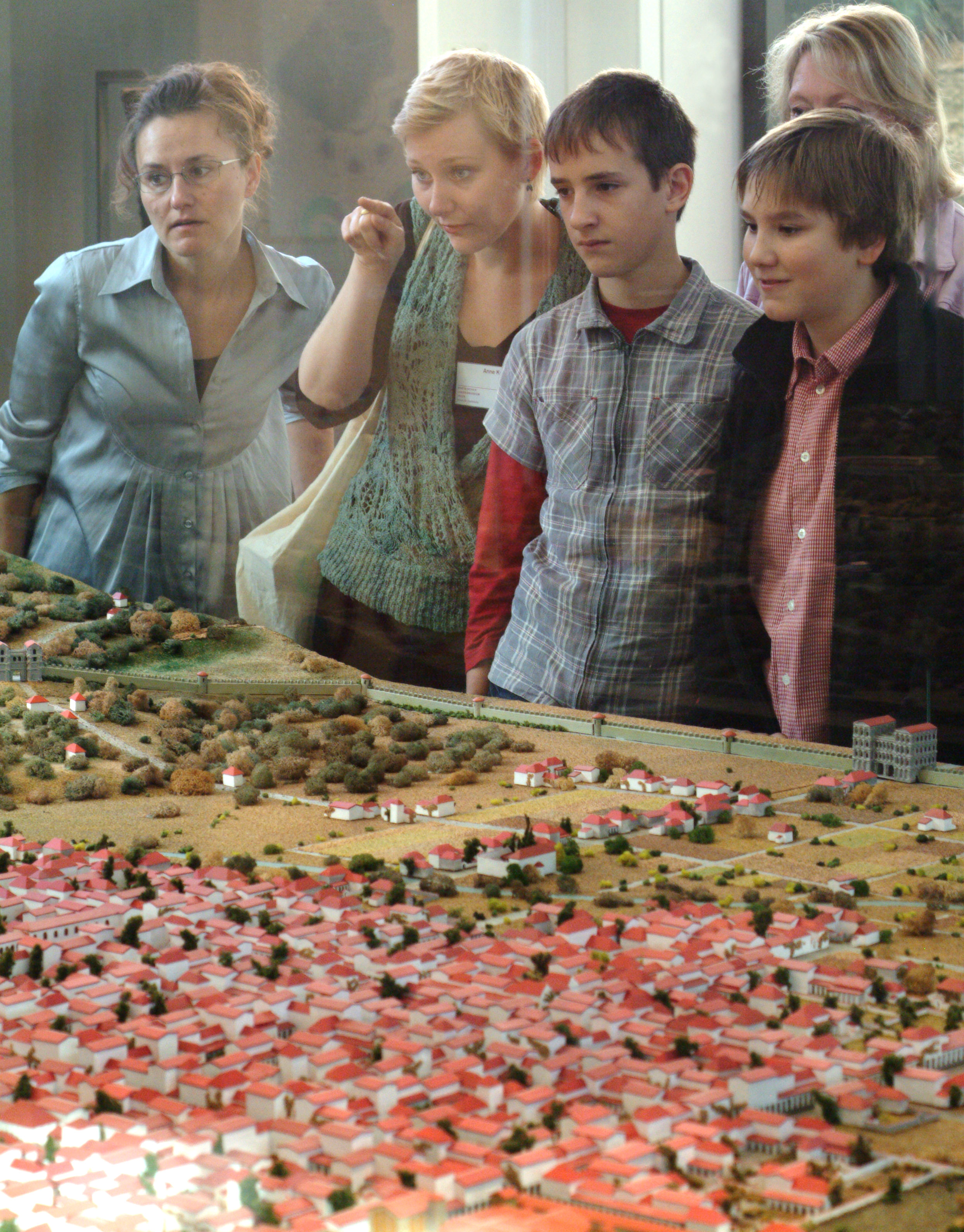 Führung vor dem Modell des spätrömischen Trier